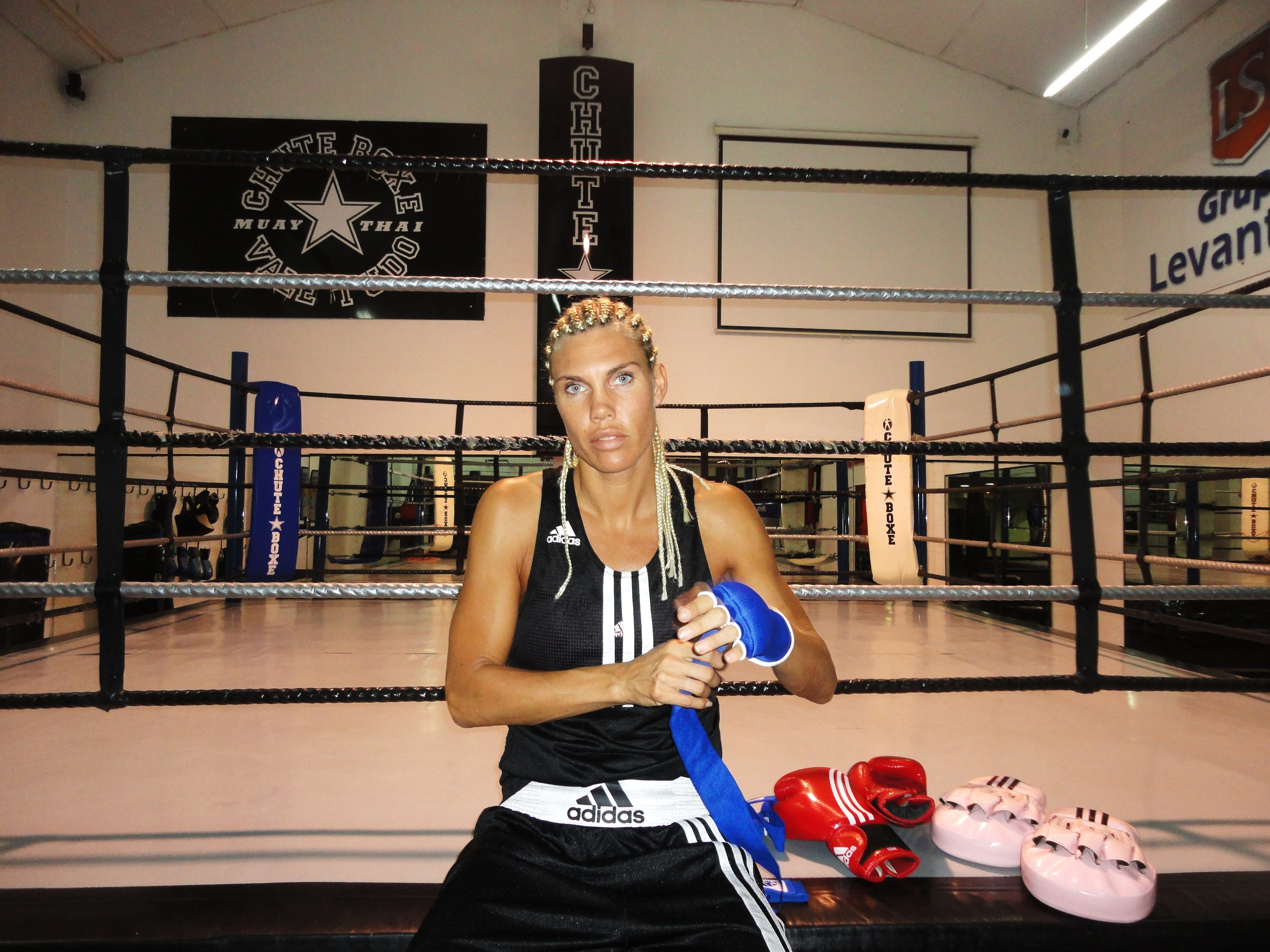 Proffsboxaren och f.d. simmaren Mikaela Laurén.